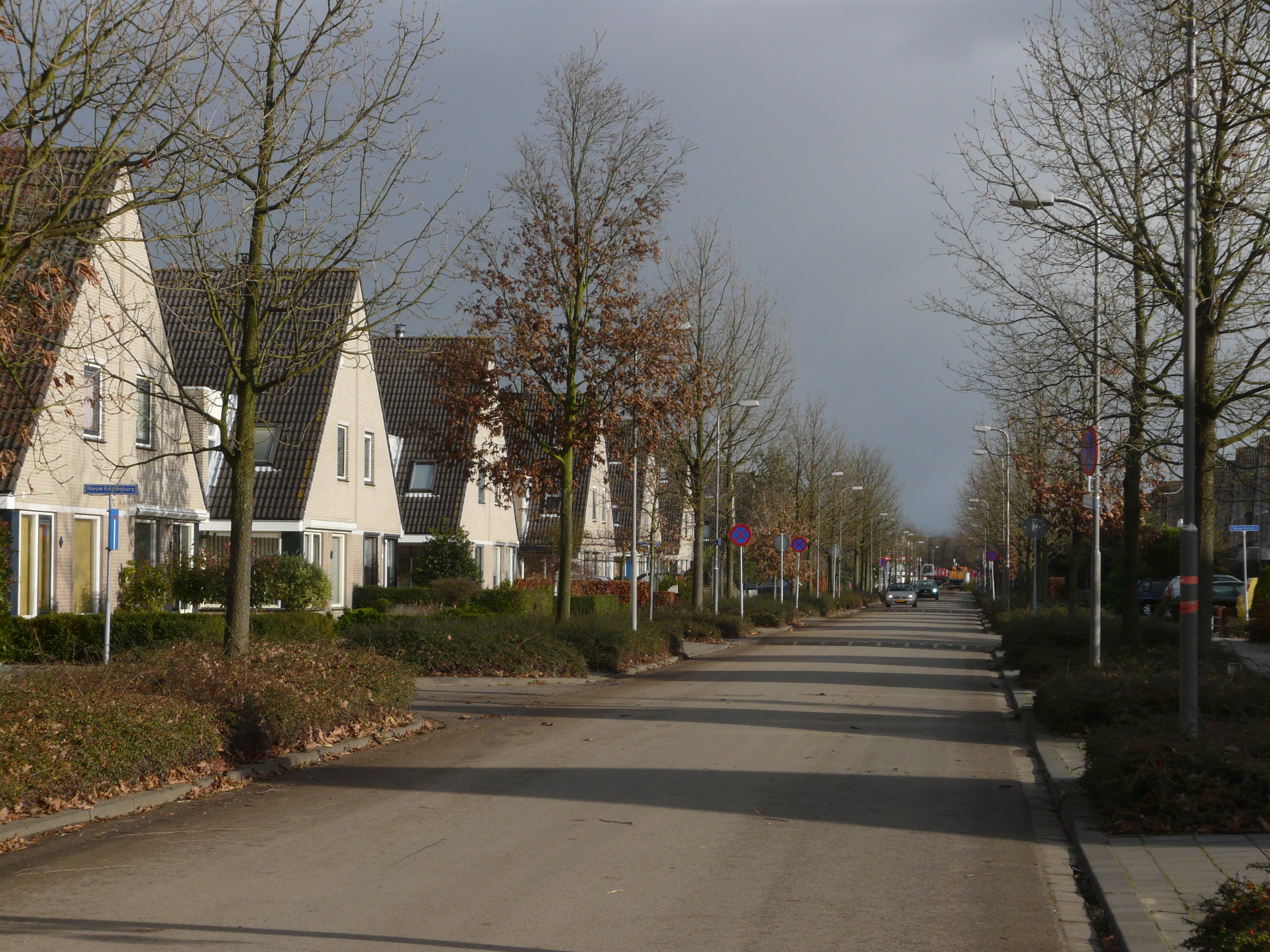 Zicht op deel van de straat de Asterdkraag in de wijk Asterd. Nabij de Asterdplas. In het grote stadsdeel de Haagse Beemden in het noorden van Breda